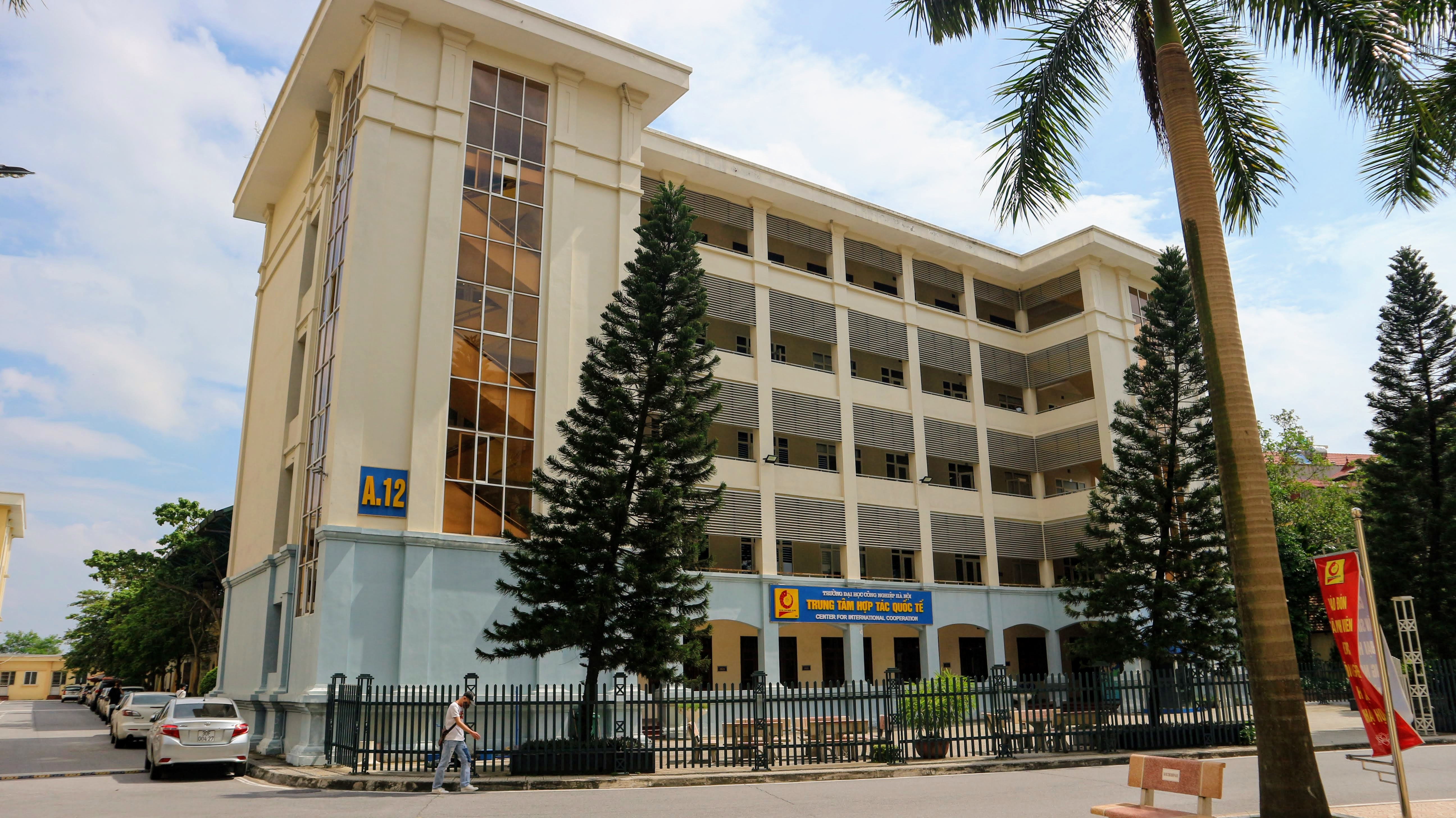 Hình ảnh được chụp bởi Huynh ICT